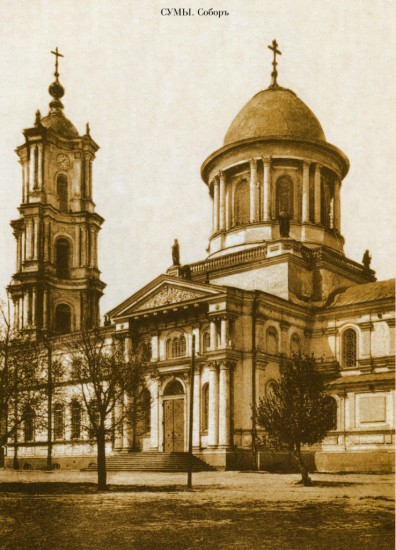 Сумський кафедральний Спасо-Преображенський собор: Фотографія у чорно-білому кольорі